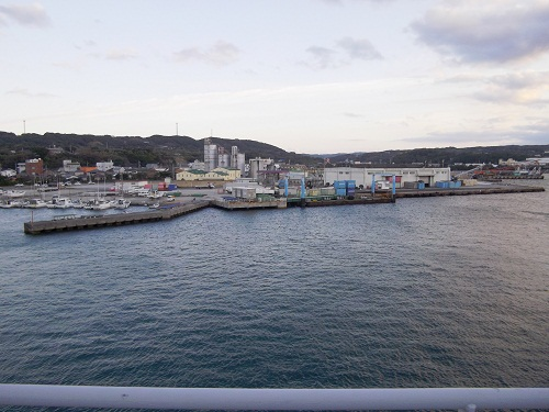 2012年12月、西之表港、19時発、共同フェリー「新さつま」甲板上から見た池田港側、はいびすかす乗り場を臨む